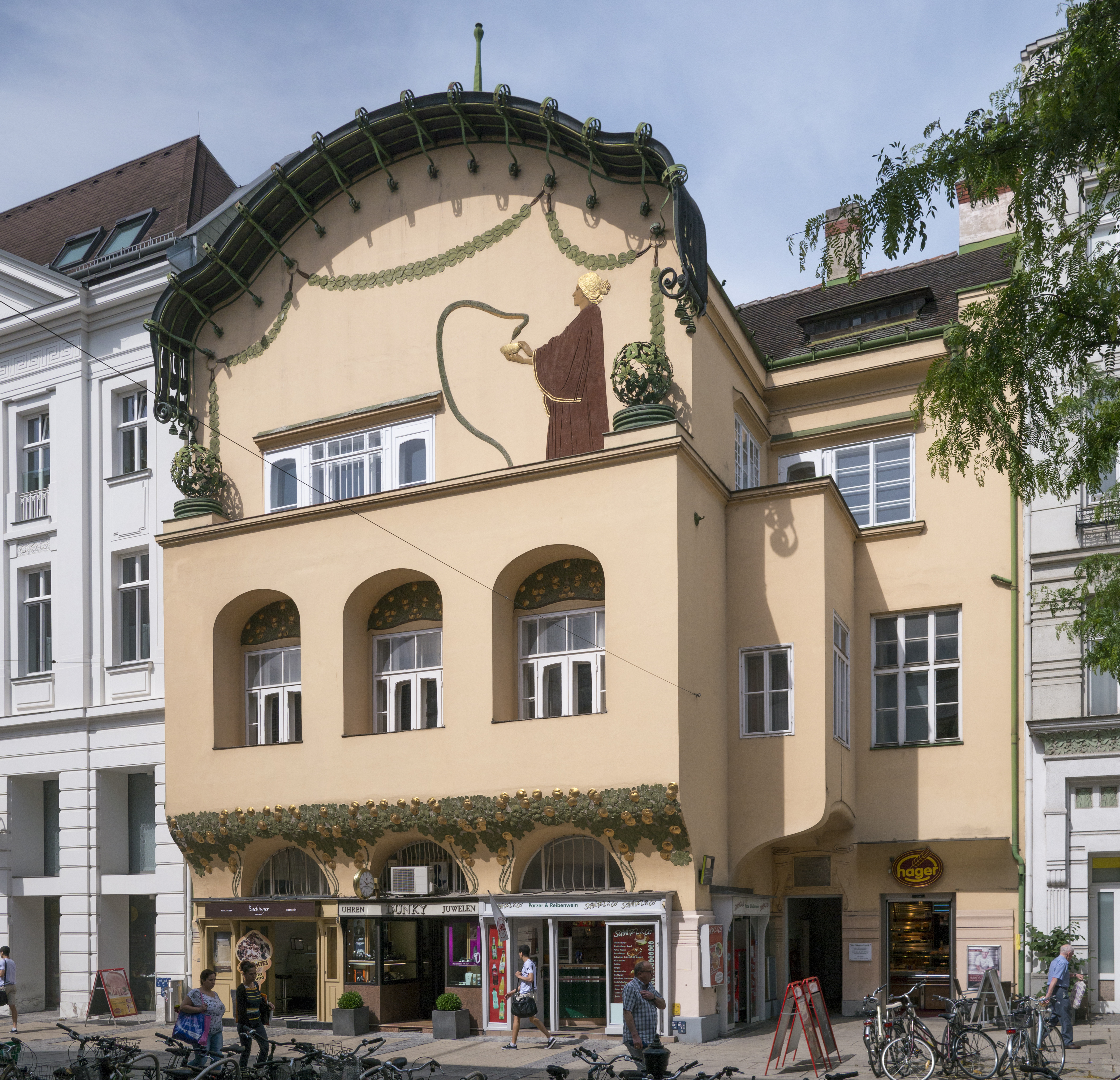 Stöhrhaus, St. Pölten